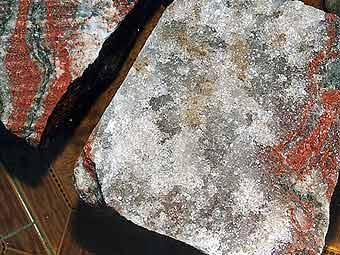 Калийная руда